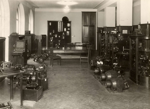 Wnętrze budynku PAST